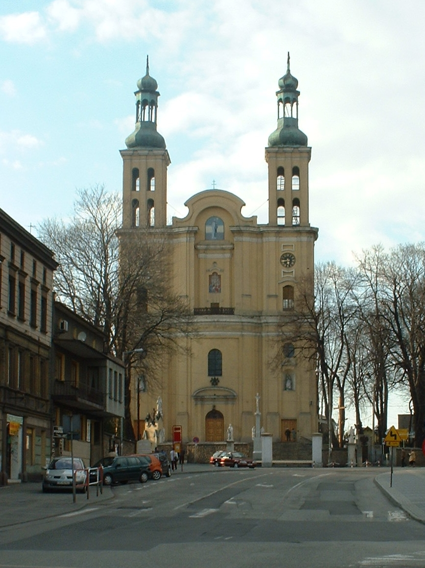 Baroque Basilica in Pszów, Silesia, Poland